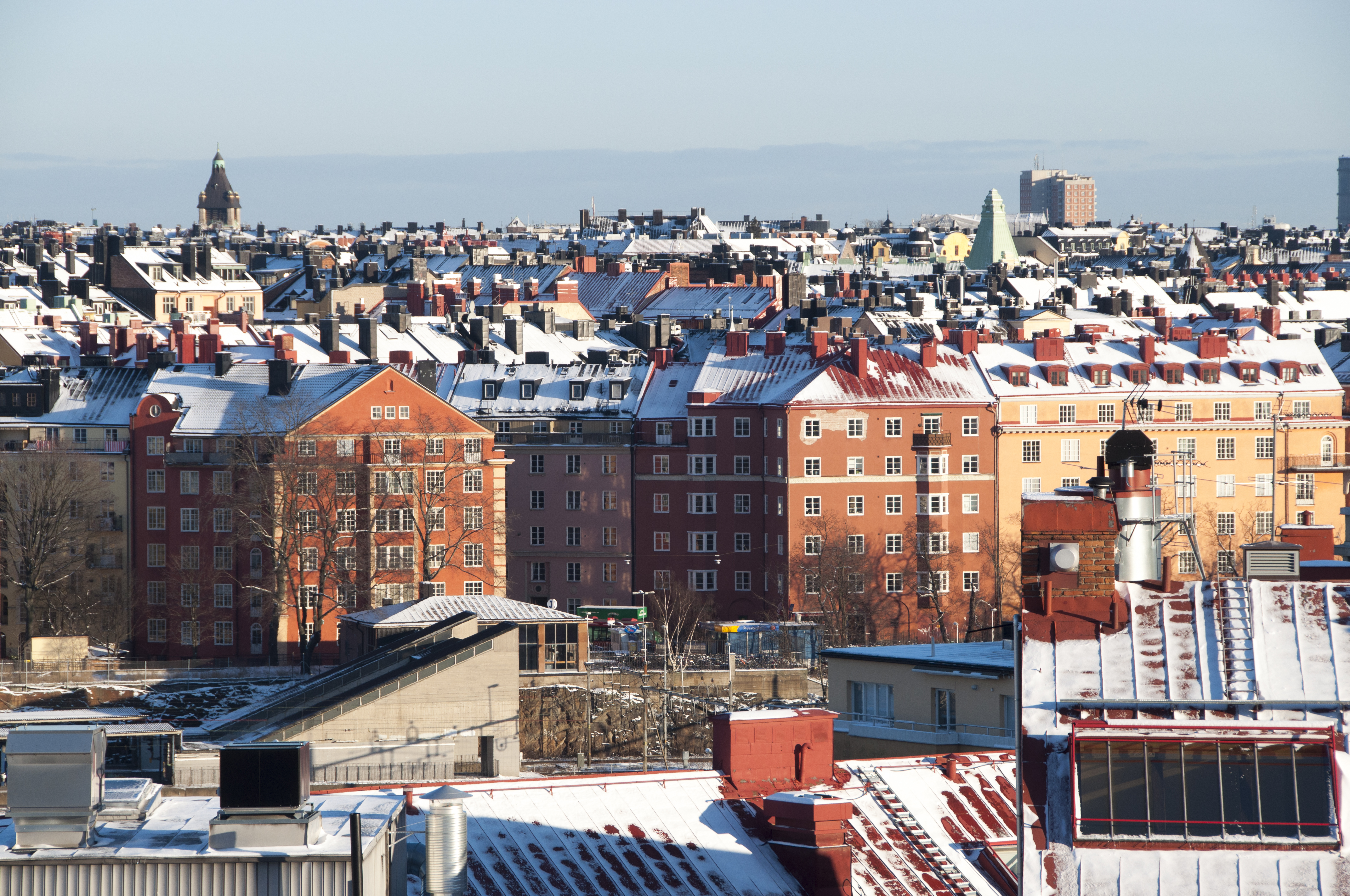 Takåsar i Vasastan, sett från Stadshsgsberget